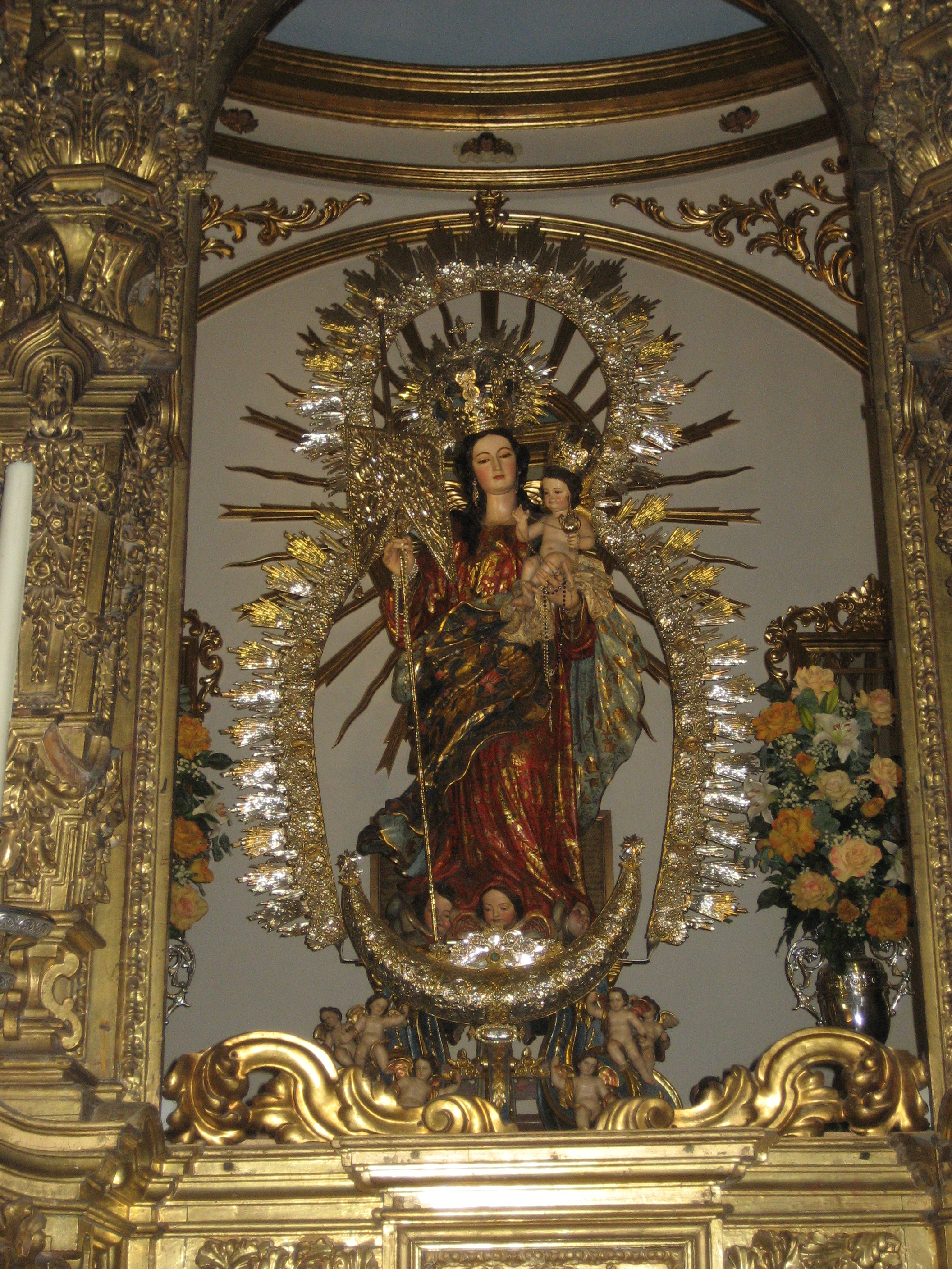 Imagen de la Virgen de la Aurora,(1698) en la iglesia de San Francisco Solano de Montilla (Córdoba) Spain.